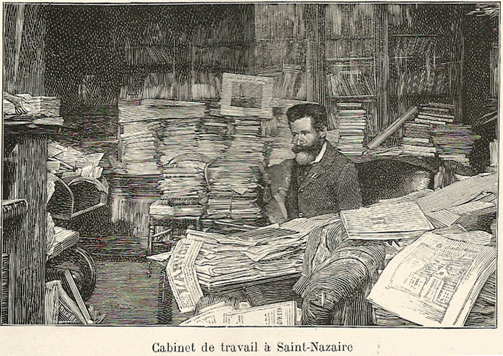 Kerviler Kambr labour